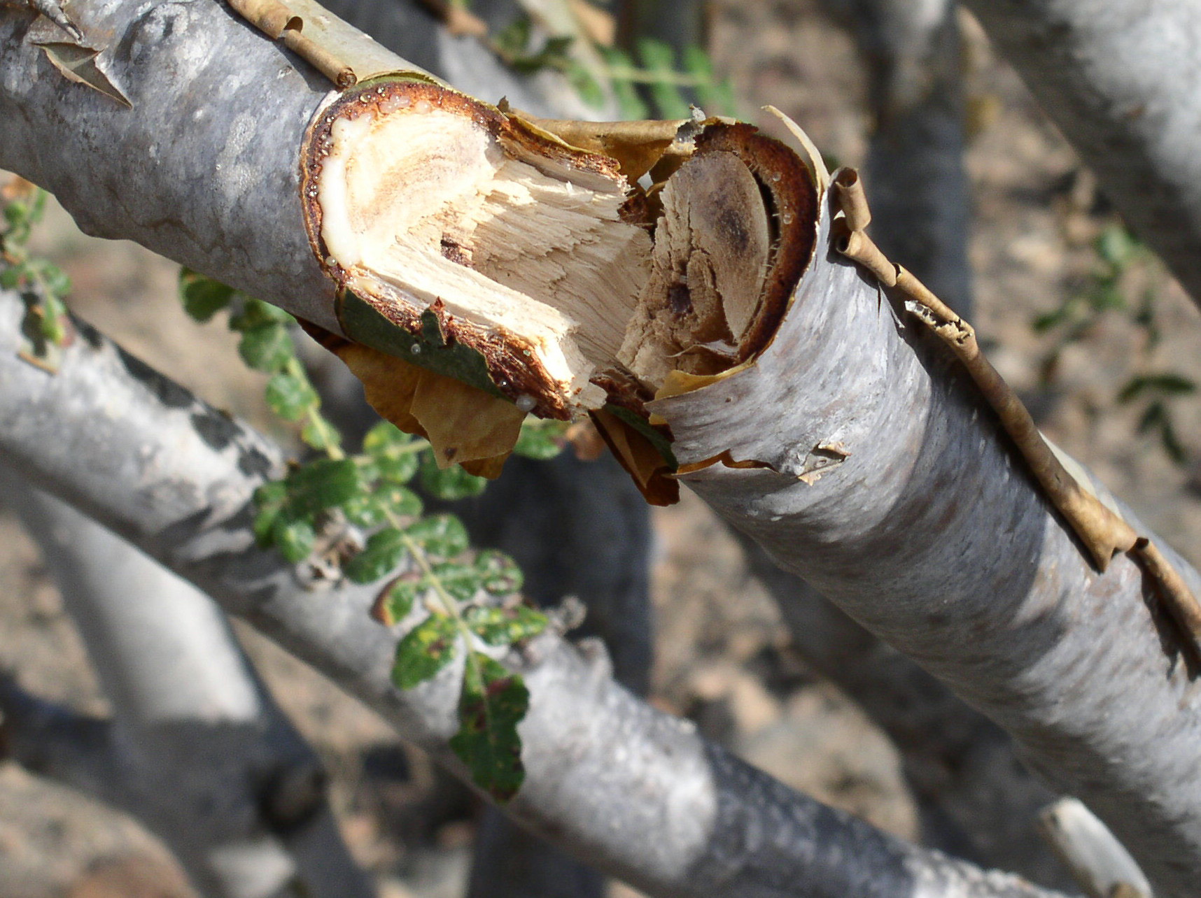 danni provocati da tagli su Boswellia sacra